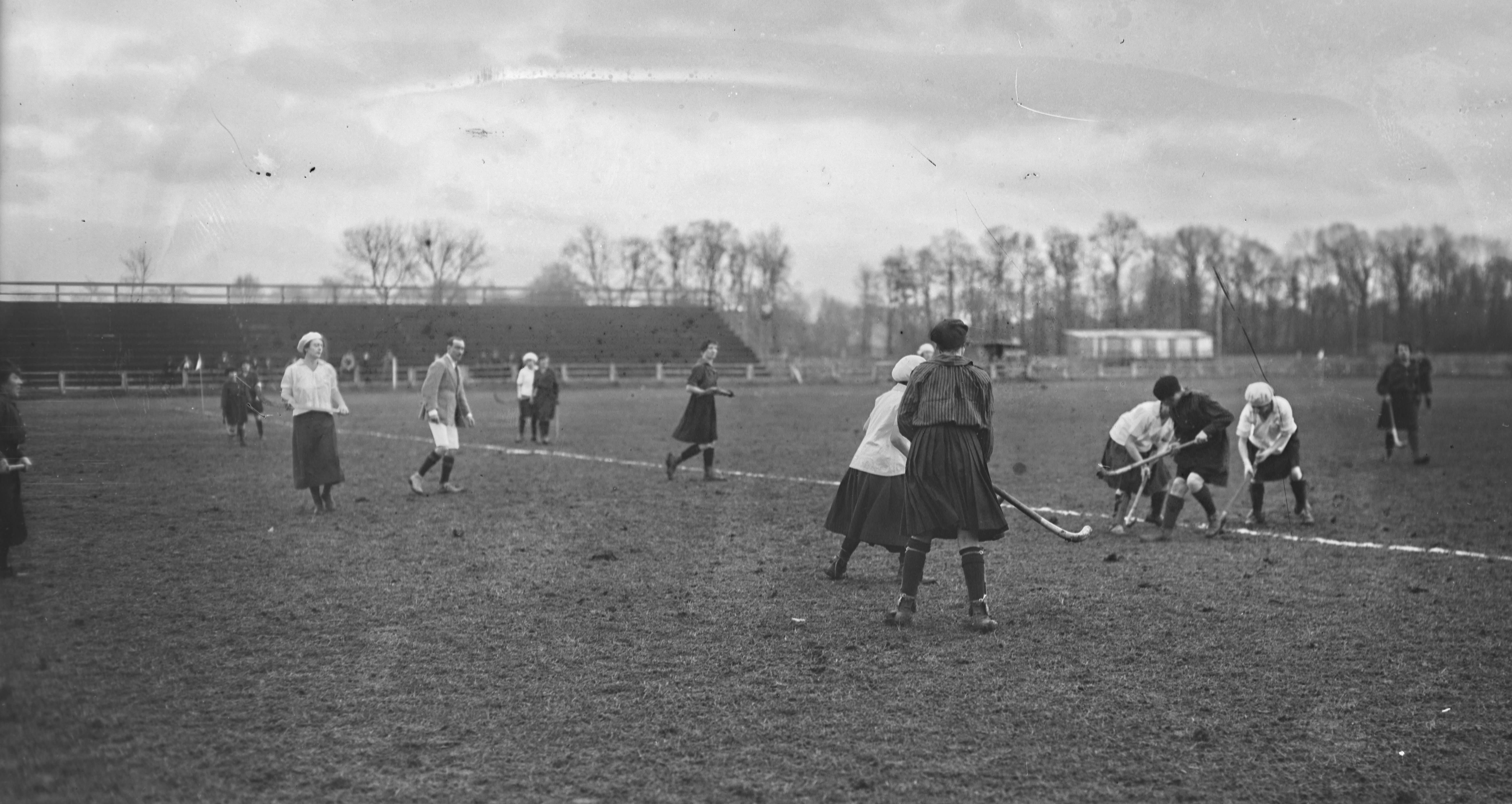 Colombes, 1/1/21, Racing Club de France contre Lyon Olympique Universitaire, match de hockey sur gazon féminin.